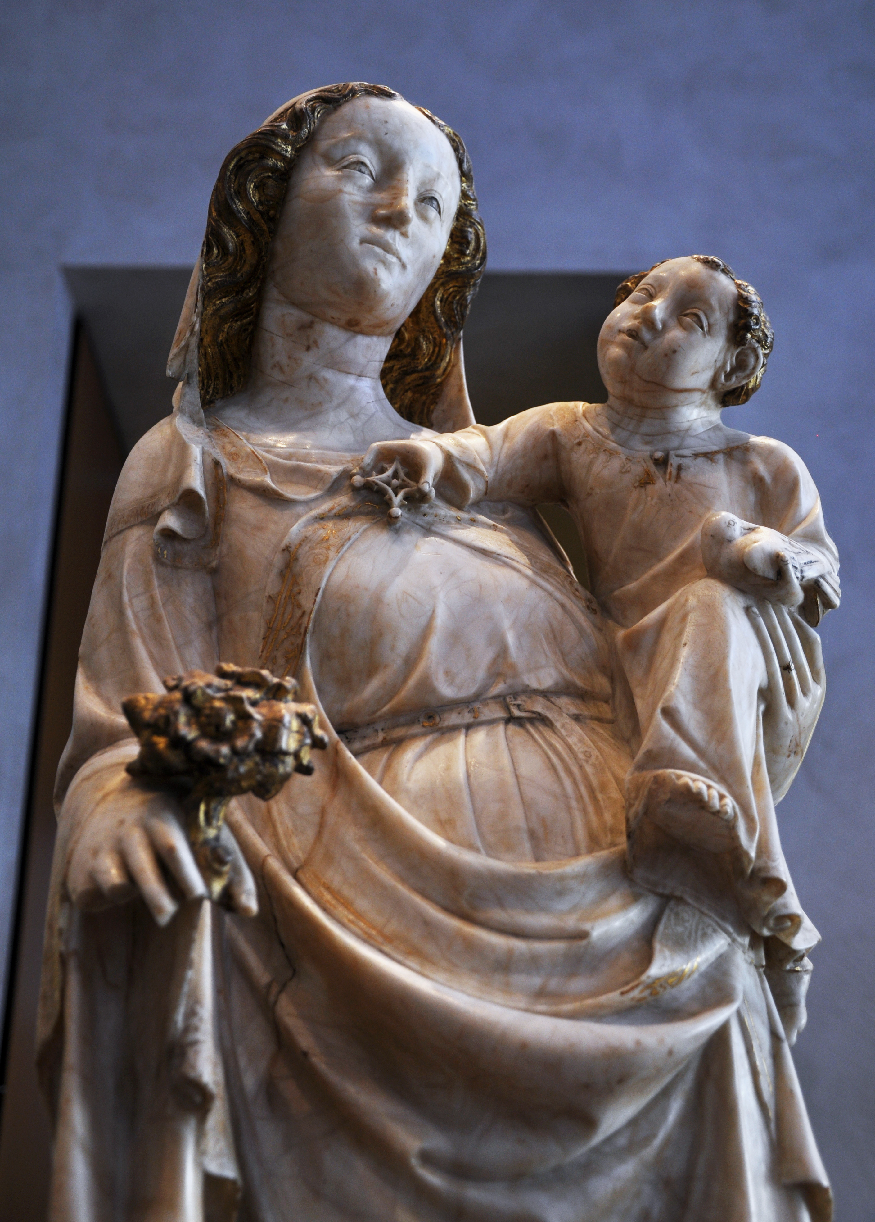 Vierge à l'Enfant, Ile-de-France, milieu du 14ème siècle, albâtre. Musée des Beaux-Arts de Lyon.